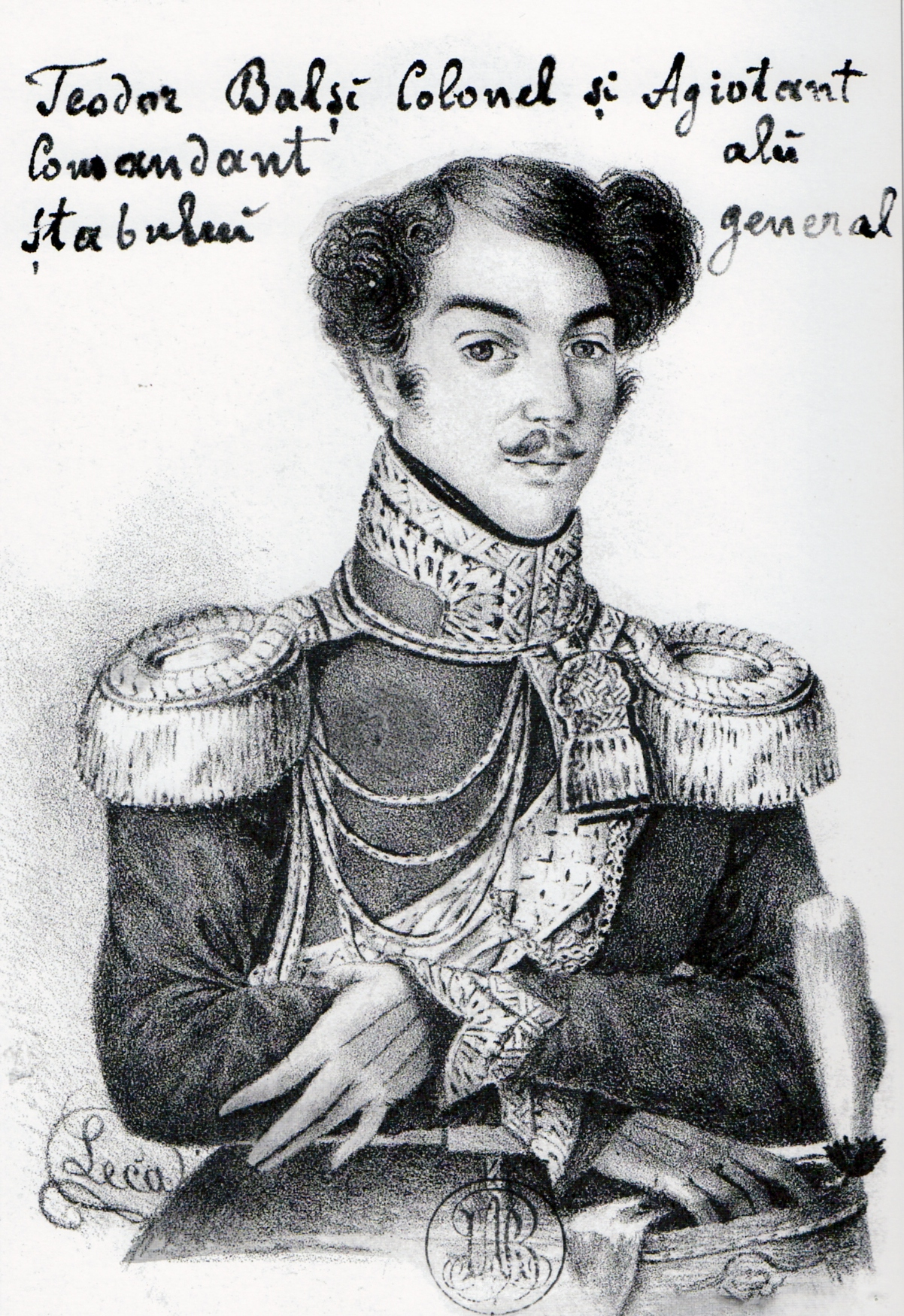 Theodor Bals, litografie, Biblioteca Academiei Române